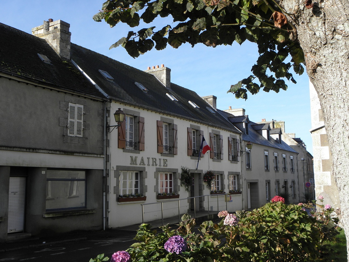 Mairie d'Henvic (29).